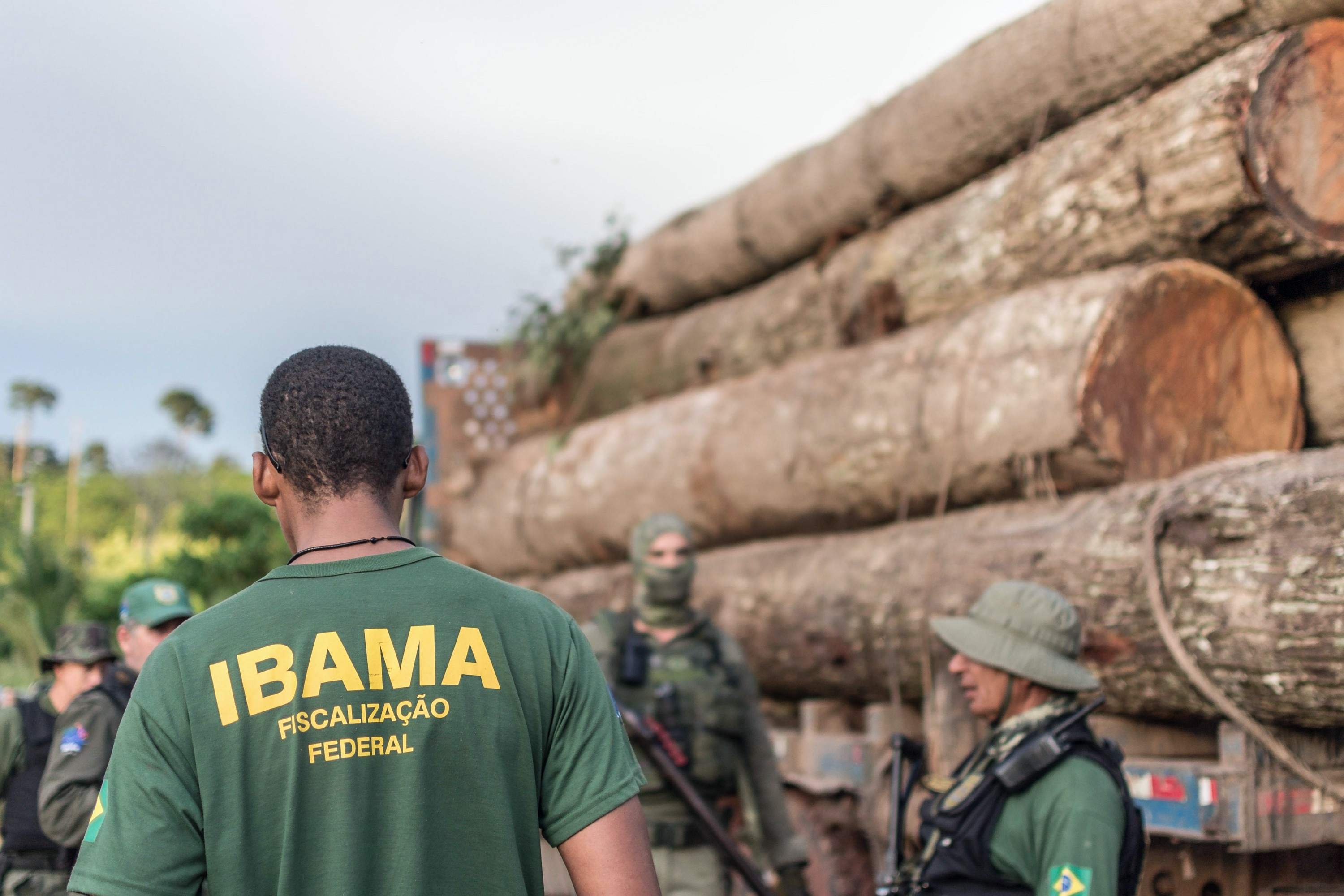 Ibama apreende carregamento de Ipê extraído ilegalmente da Terra Indígena Cachoeira Seca, Pará Foto: Vinícius Mendonça/Ibama